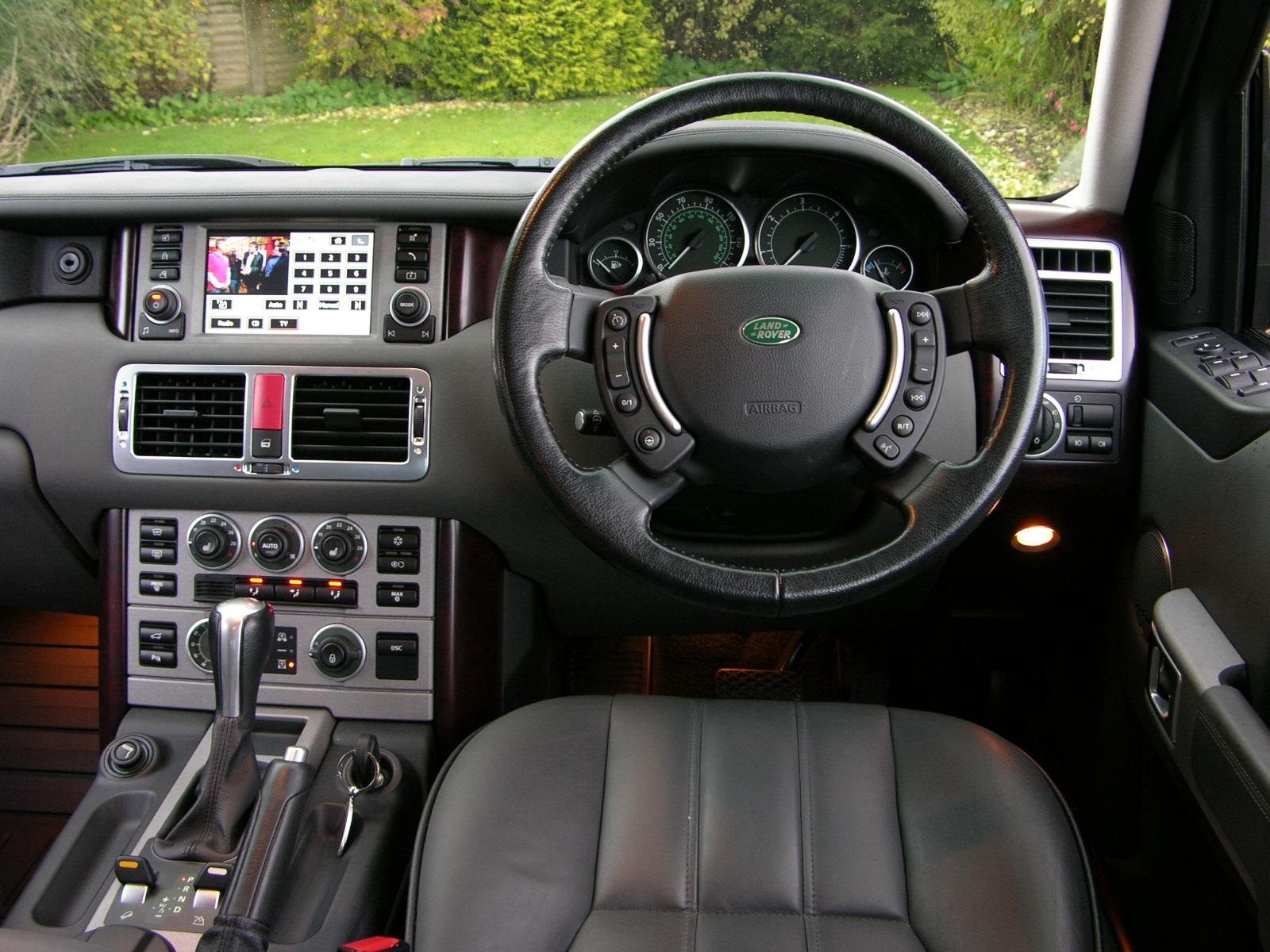 2006 Range Rover TD6 Vogue